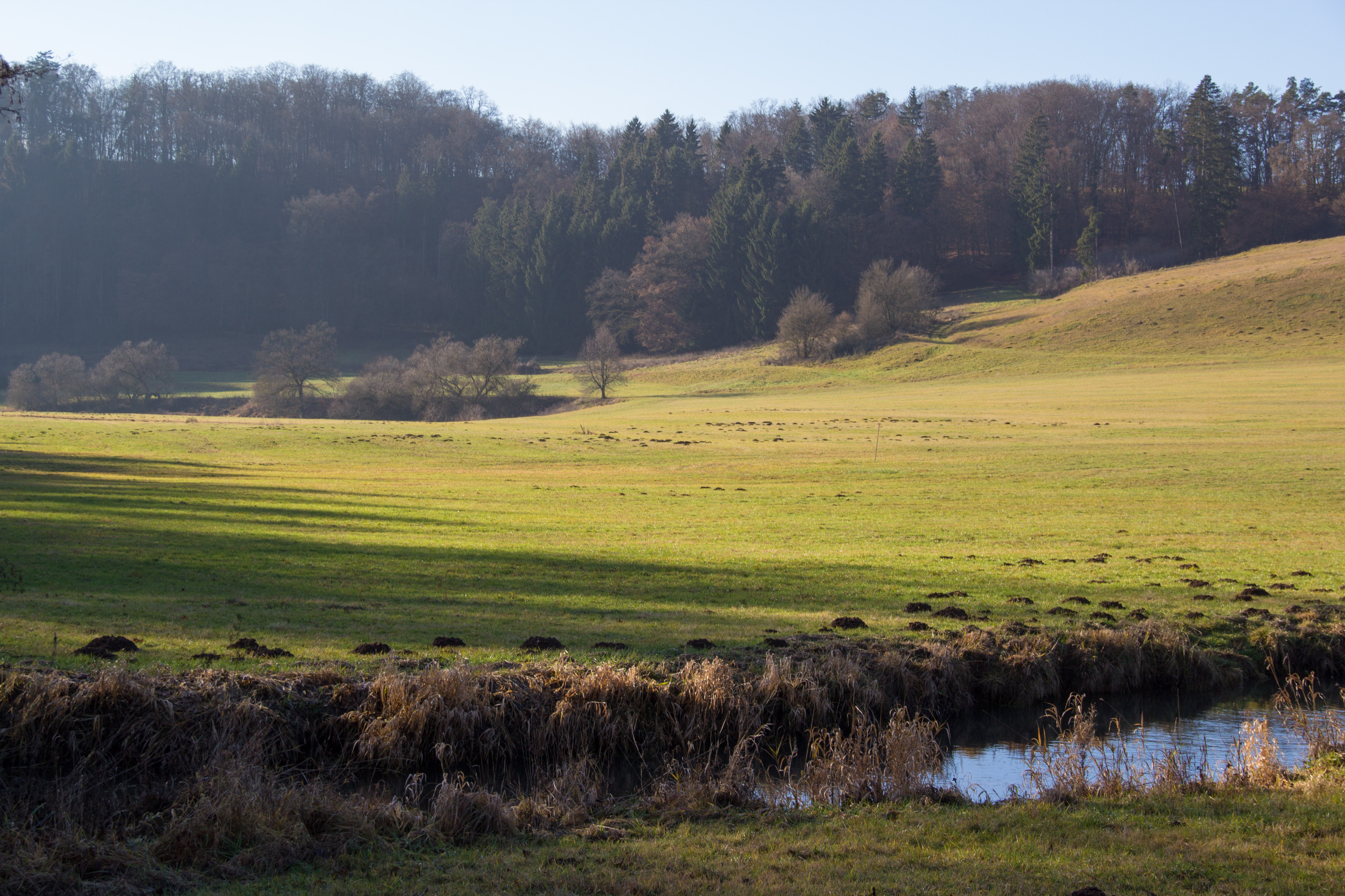 Anlauter, Bechthal